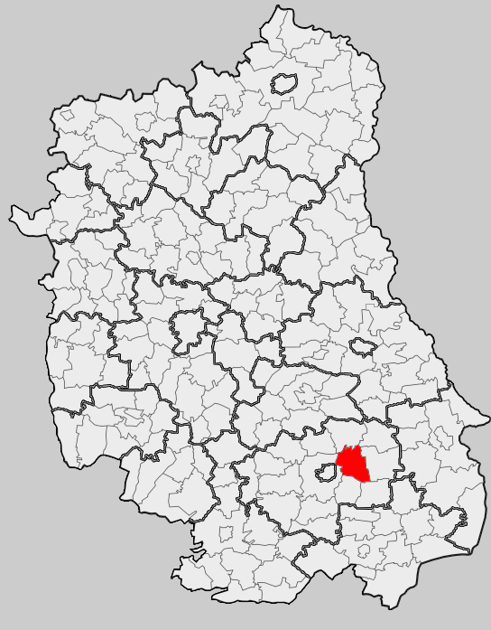 Map of gmina Sitno, Zamość county, Lublin voivodship Mapa gminy Sitno, powiat zamojski, województwo lubelskie